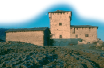 Vilanañeko dorrea eta jauregia